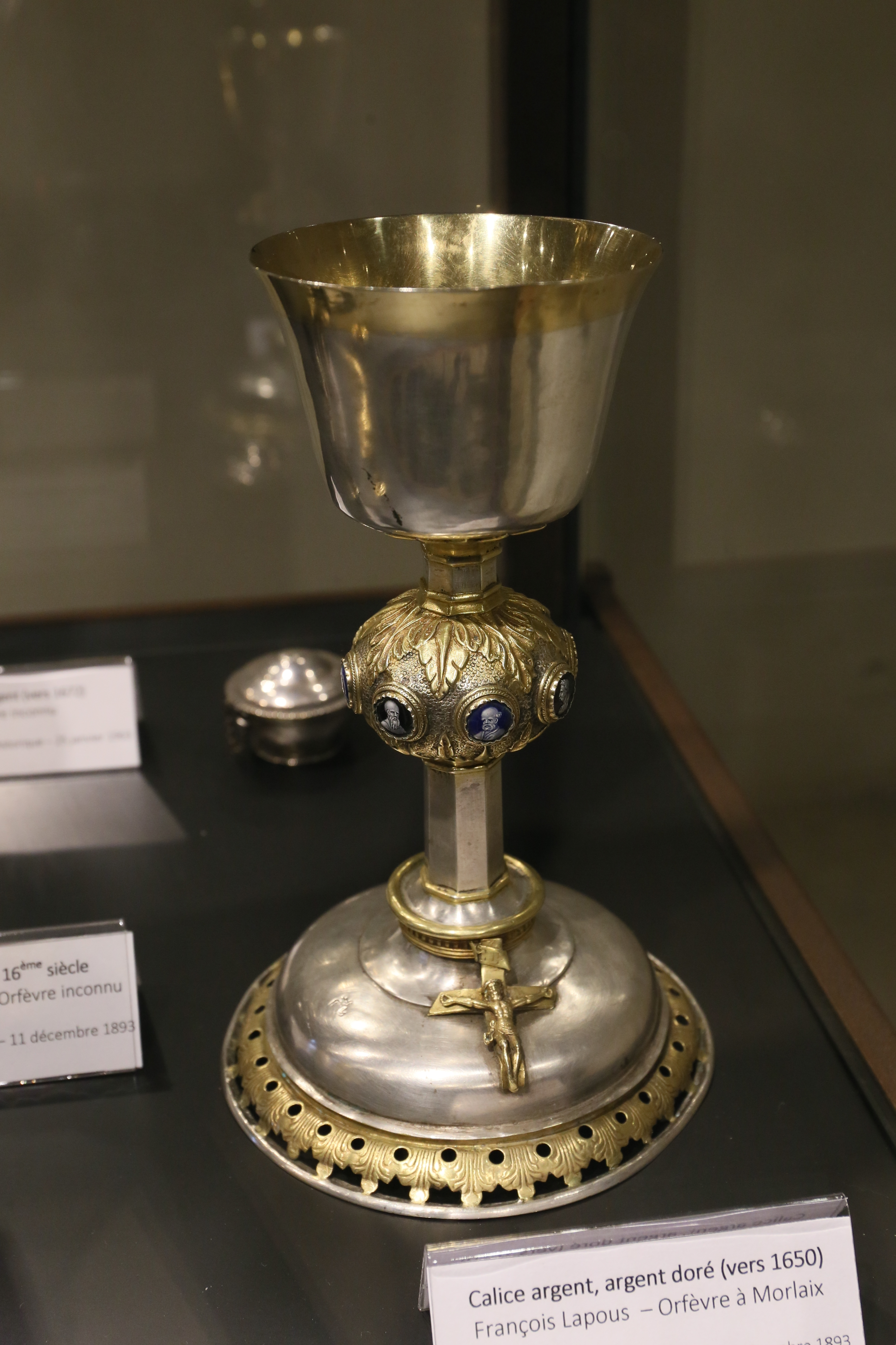 Calice en argent doré et émaux peints, datant du XIVe siècle (ou du début du XVIIe siècle), classé au titre objet des monuments historiques le 11 décembre 1893. Attribué à François Lapous.